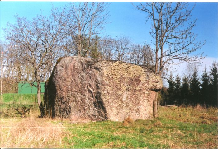 Aruküla hiidrahn.